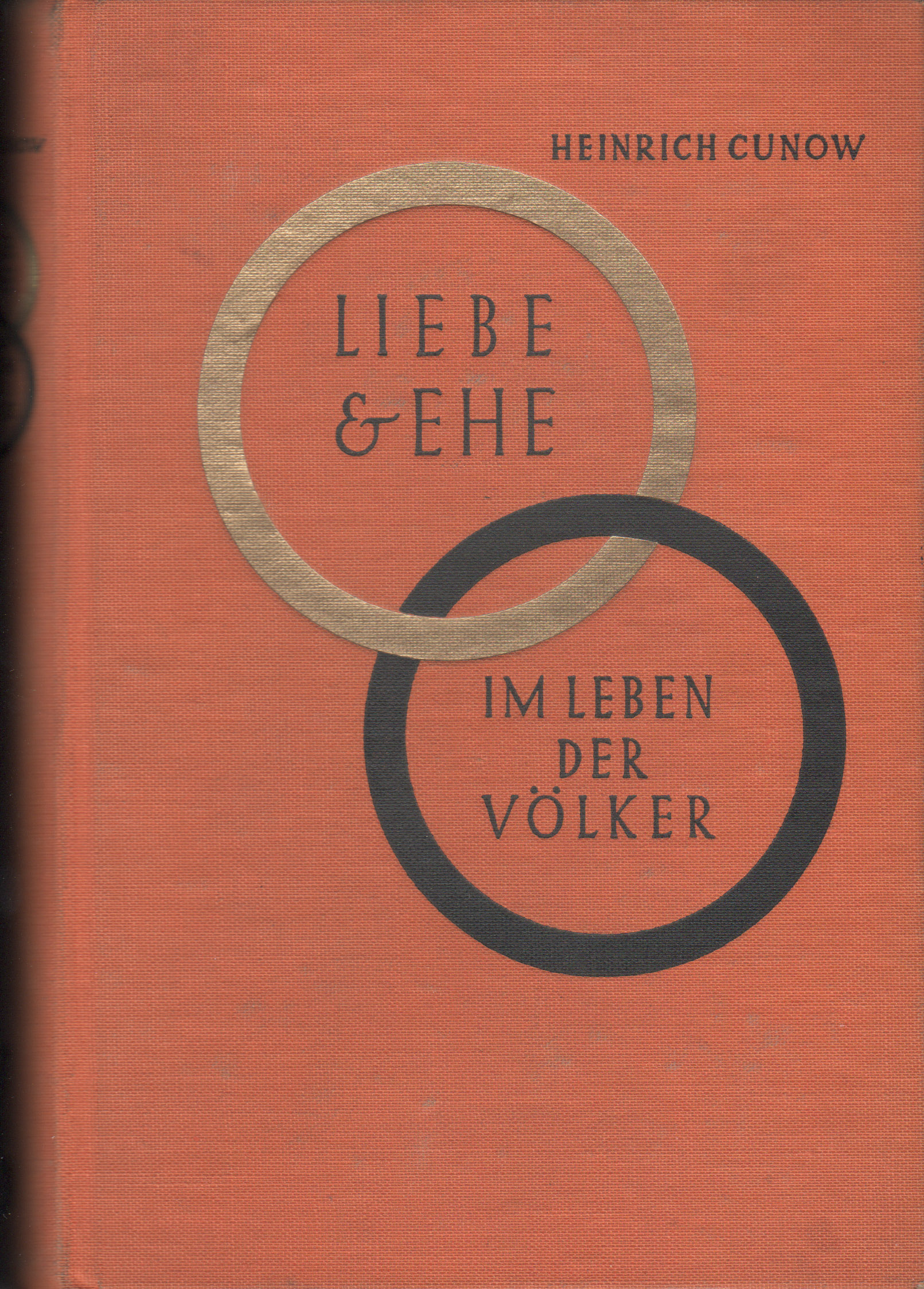 Liebe & Ehe im Leben der Völker, Autor Heinrich Cuno, Der Bücherkreis G.M.B.H. Berlin Erstausgabe 1929, das Buch enthält 260 Seiten mit Grafiken von Menschen verschiedenster Völker.